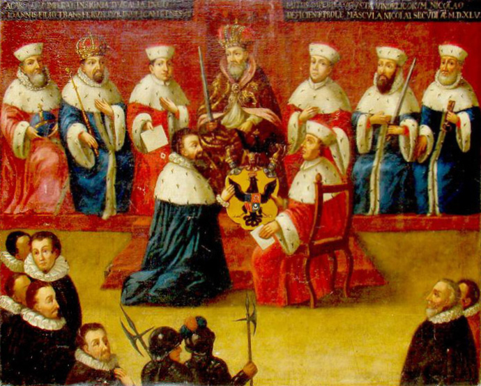 Беларуская (тарашкевіца): Мікалай Радзівіл «Чорны» (Mikałaj Radzivił «Čorny») атрымлівае тытул князя на Алыцы і Нясьвіжы